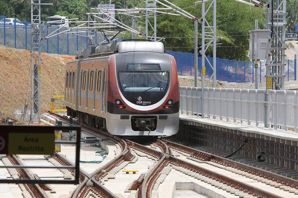 Estação Pirajá (7)